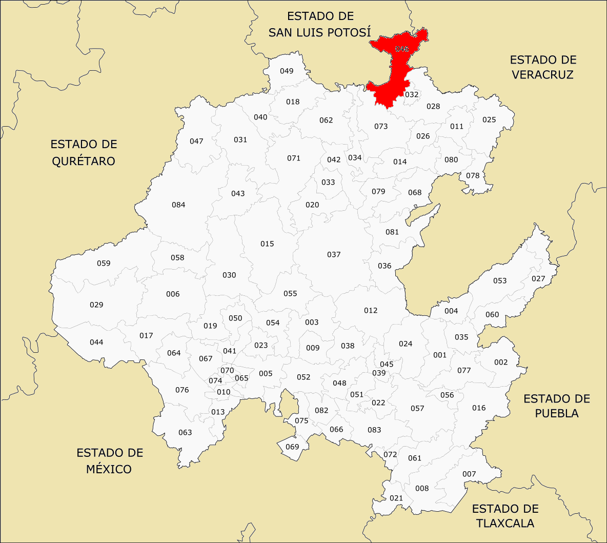 Municipio de Hidalgo